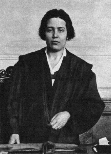 Fotografía de la abogada española y política radical socialista Victoria Kent publicada al poco de su nombramiento como Directora General de Prisiones en 1931